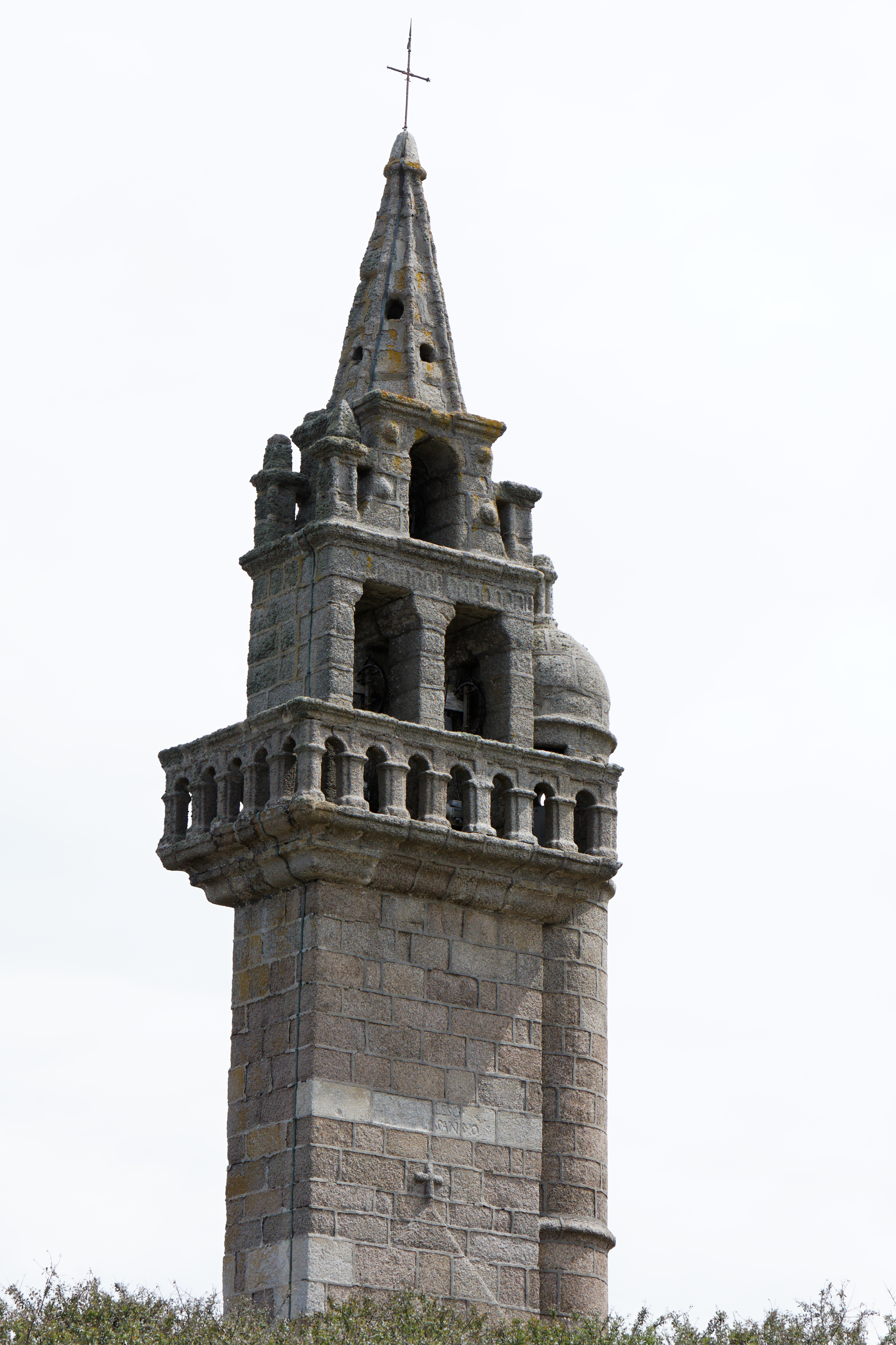 Le clocher de la chapelle. .